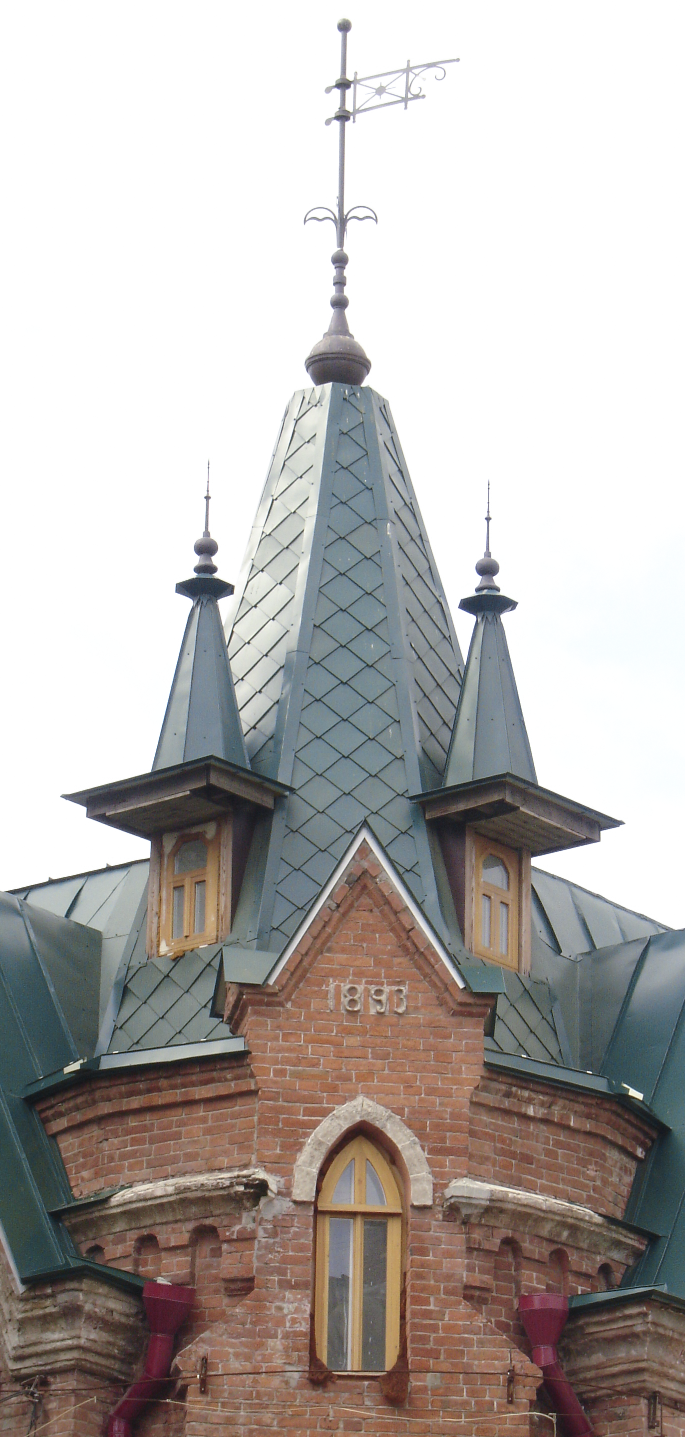 Дом братьев Мартын (Ростовская область, Ростов-на-Дону, Большая Садовая улица, 125). Башня с флюгером и годом постройки крупным планом.